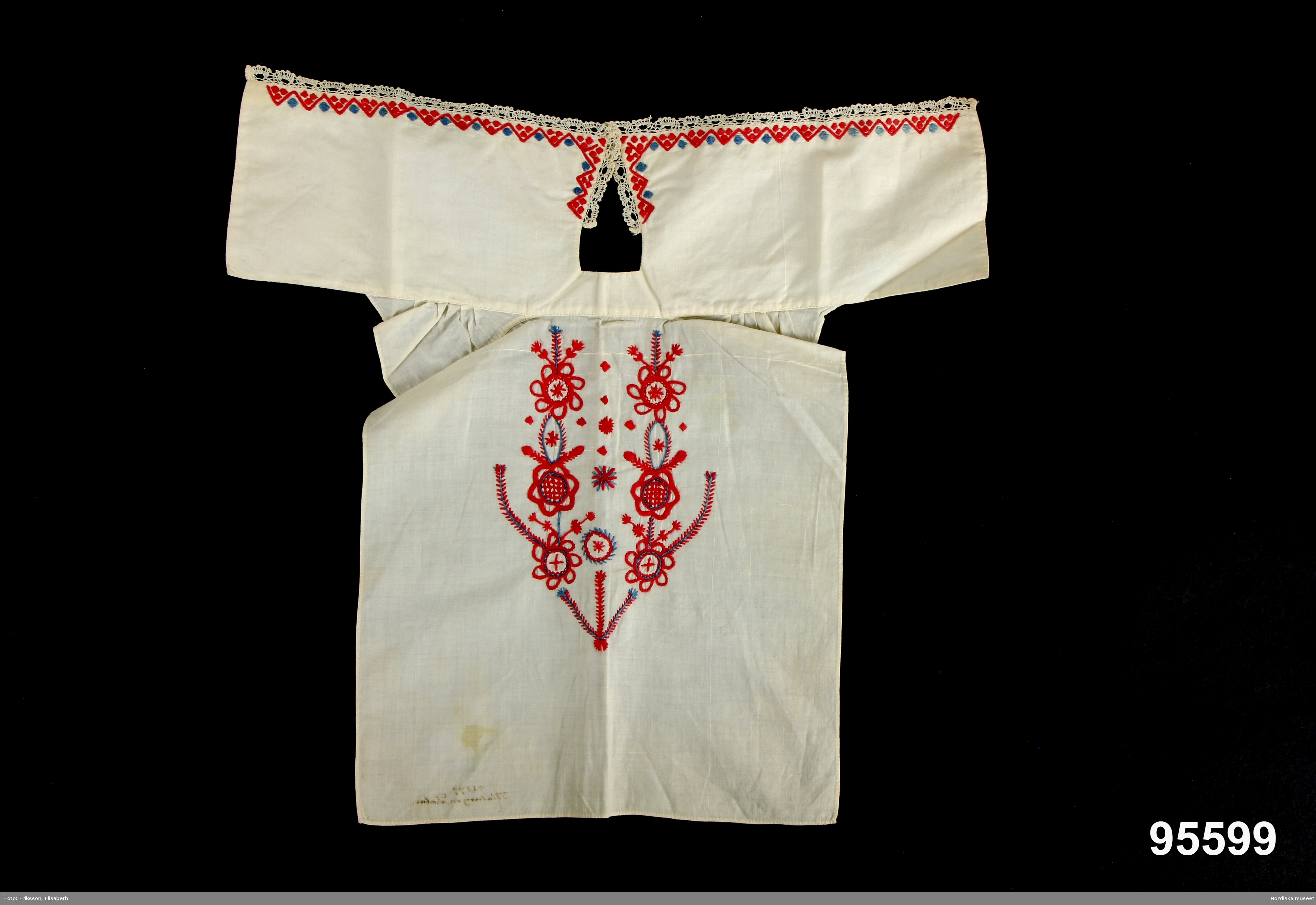 Blommor